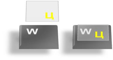 russischer (kyrillischer) Tastaturaufkleber vor und nach der Anbringung auf eine deutsche Tastatur